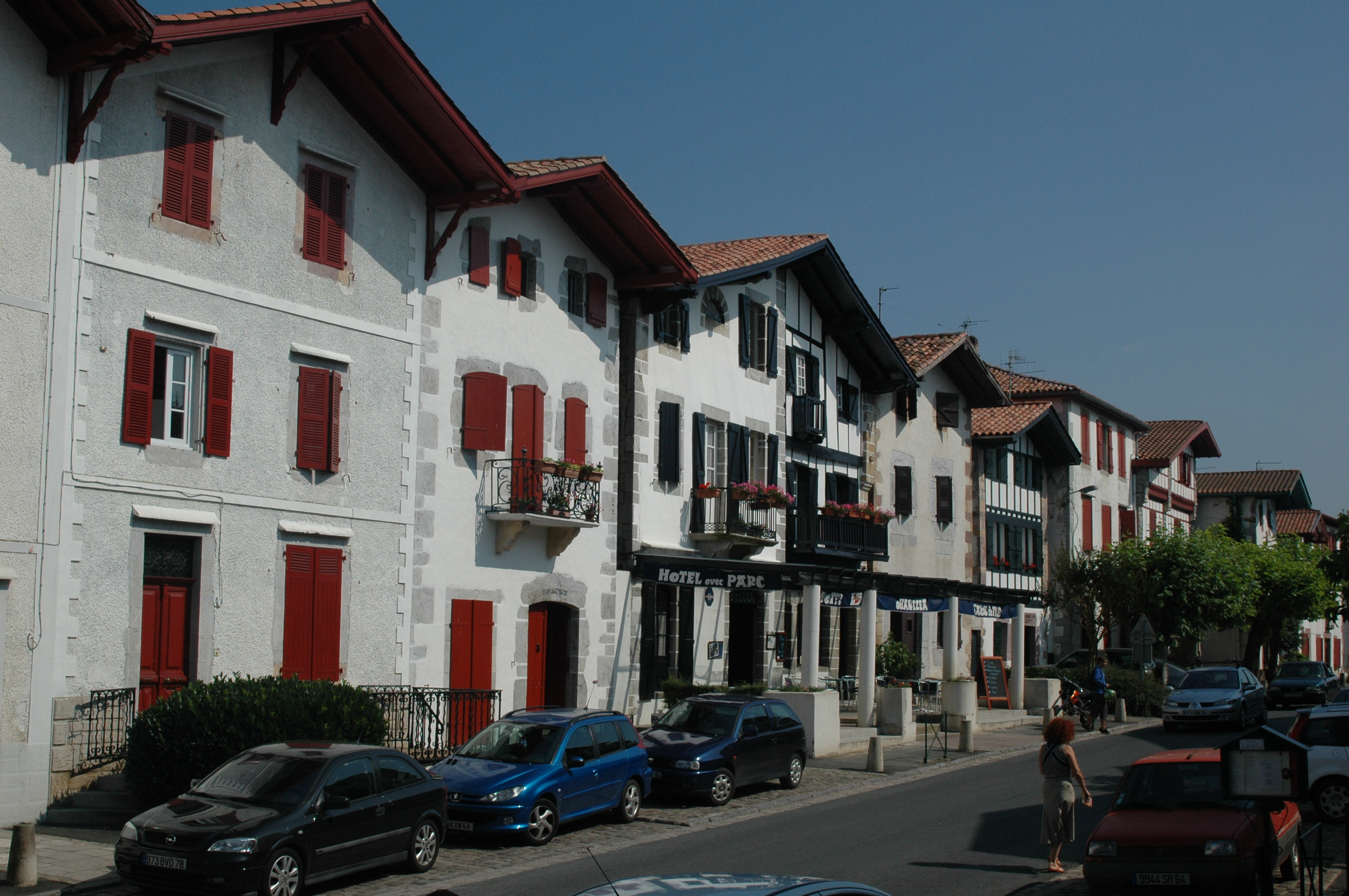 Ainhoa, rue principale, prise le 08/07/2006 par Harrieta171